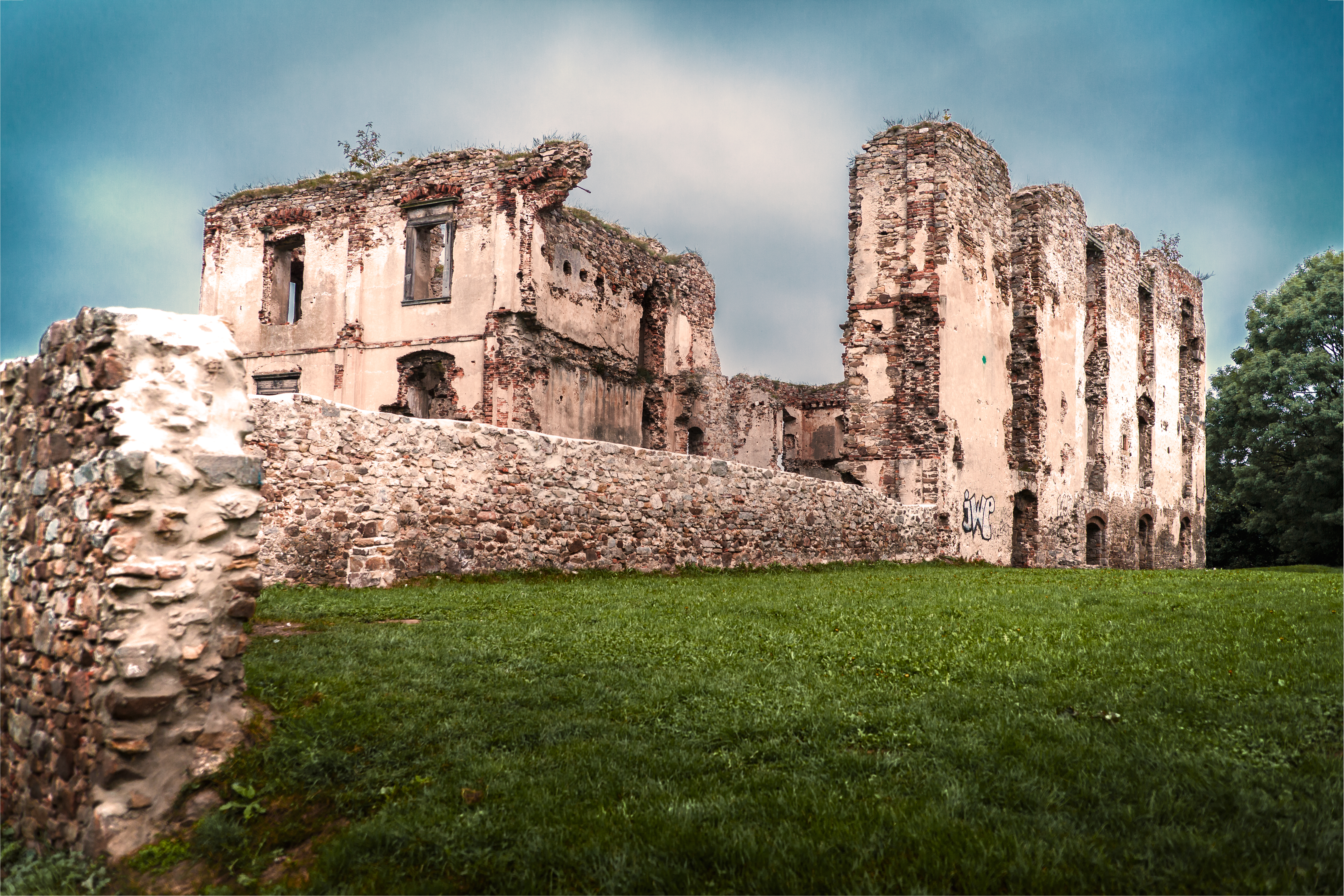 Bodzentyn, ruina pałacu (zamku), 1370 r., XV/XVI, 4 ćw. XVI w., 1681-1691, po 1920 r.